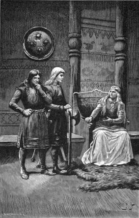 Gudrun agitating her sons